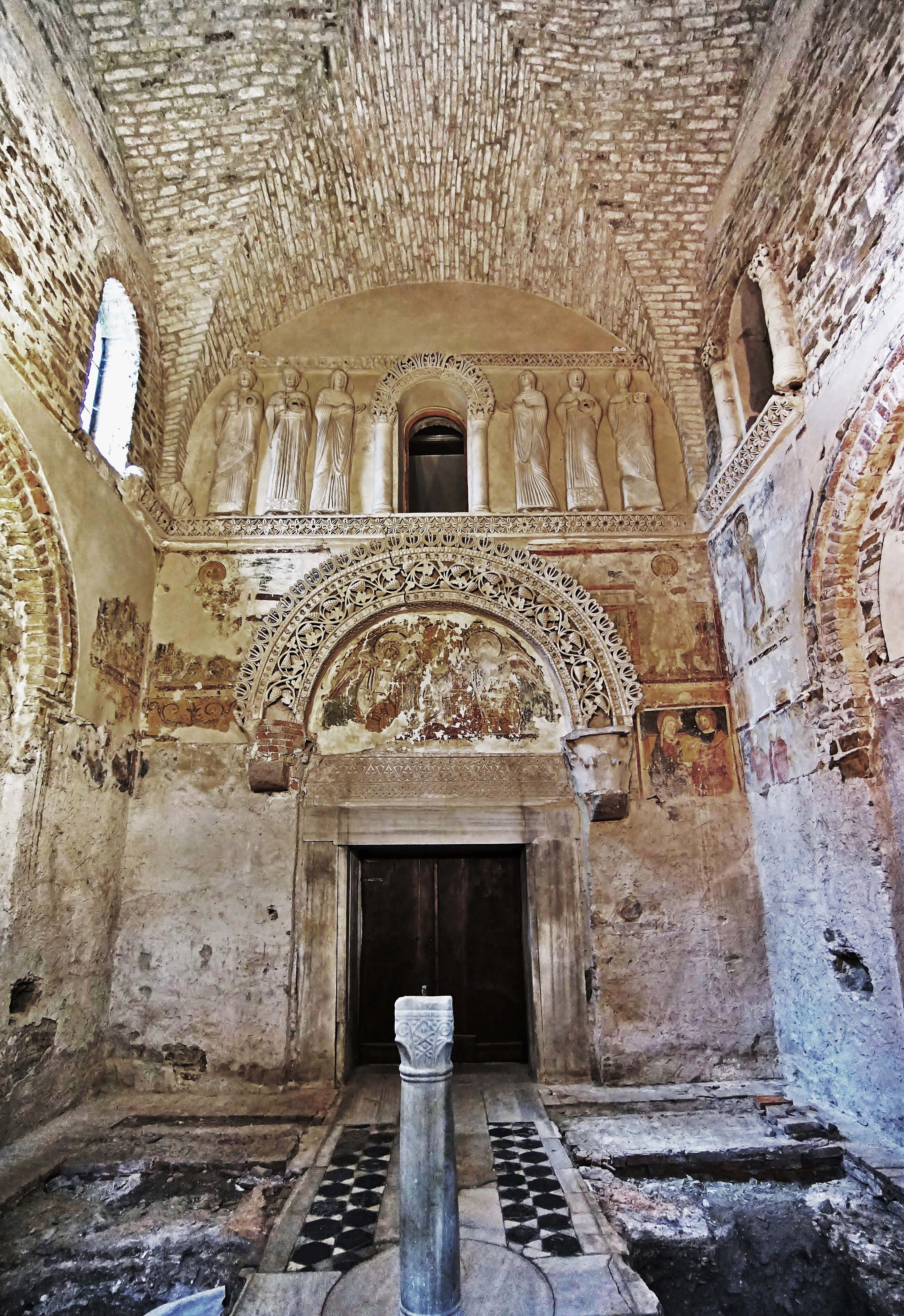 Tempietto longobardo (Cividale del Friuli), Innenansicht